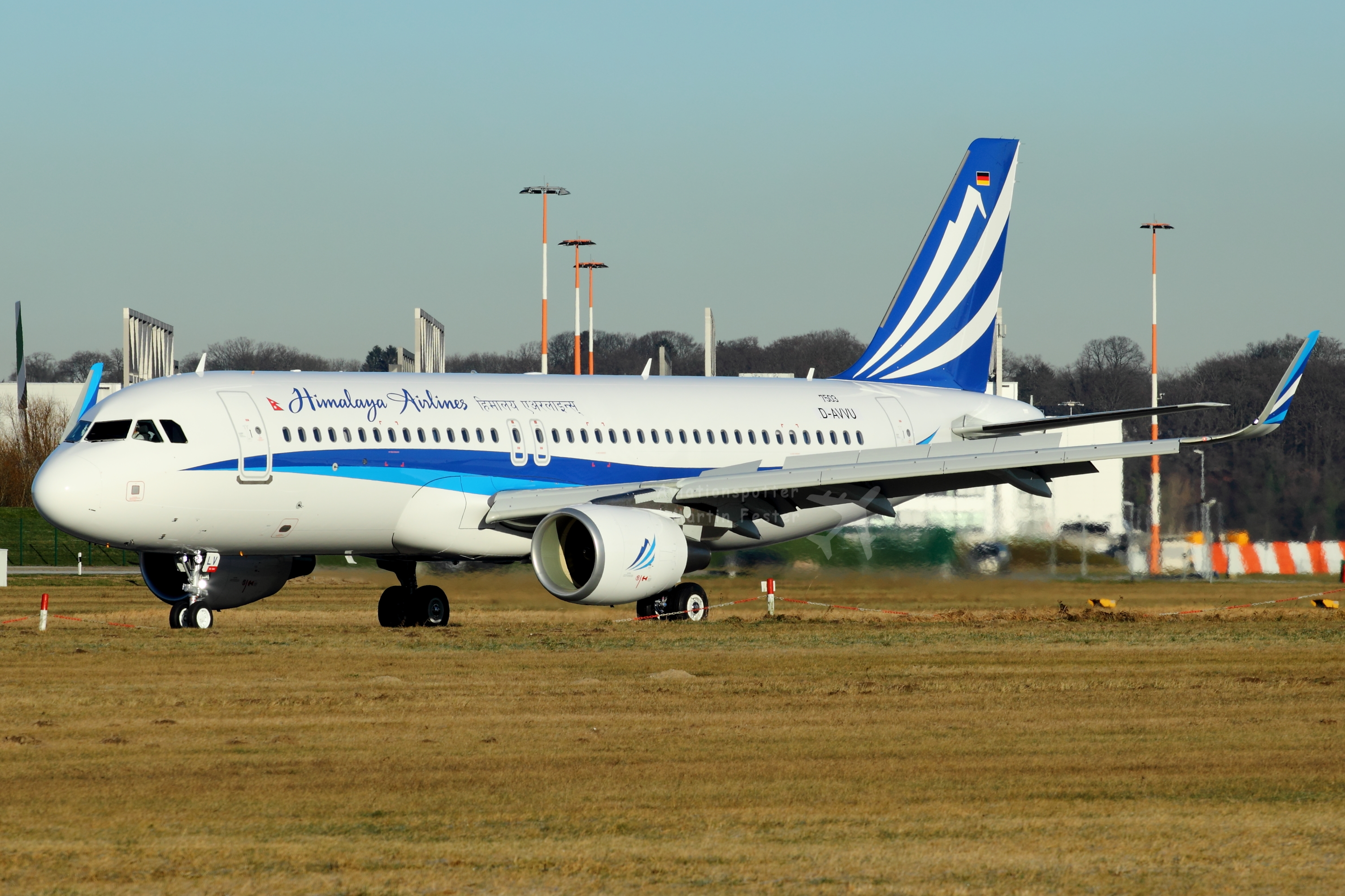 D-AVVU // Himalaya Airlines // A320-214SL // MSN 7503 // 9N-ALV